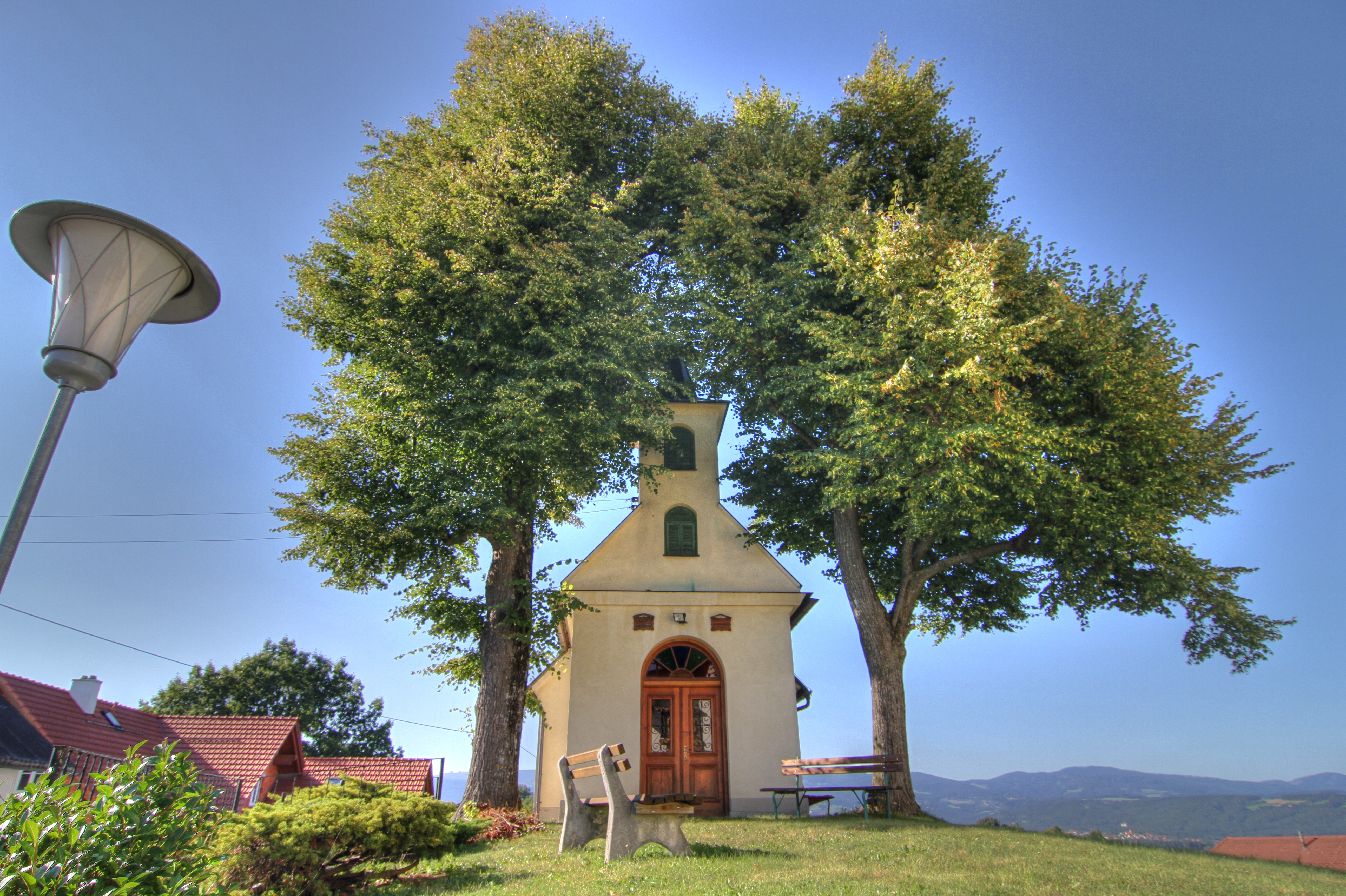 Kapelle in Hart-Purgstall (Graz-Umgebung), erbaut 1780, renoviert 1980